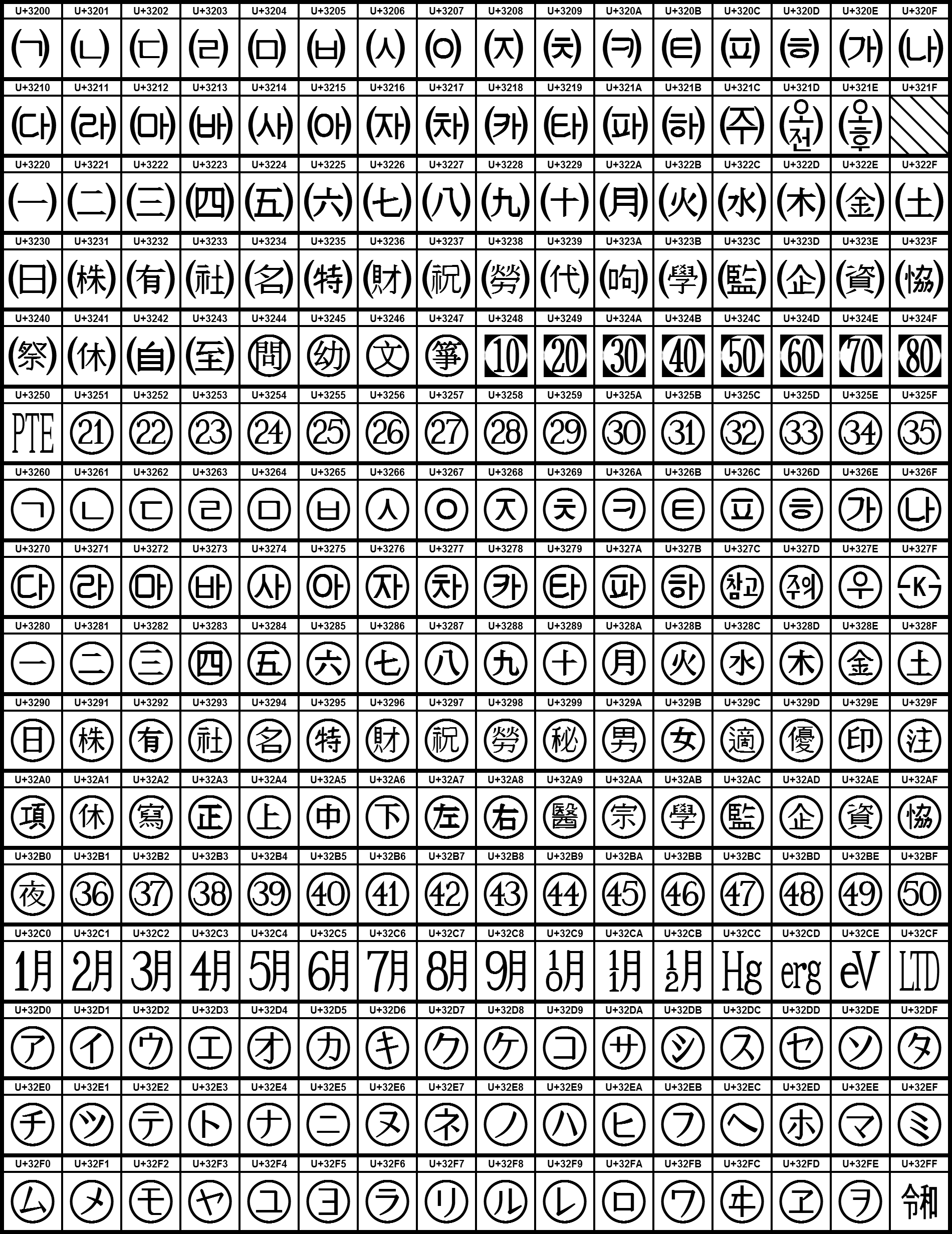 Grafiktafel für den Unicodeblock Umschlossene CJK-Zeichen und -Monate. Schraffierte Felder sind unbesetzte Codepoints.